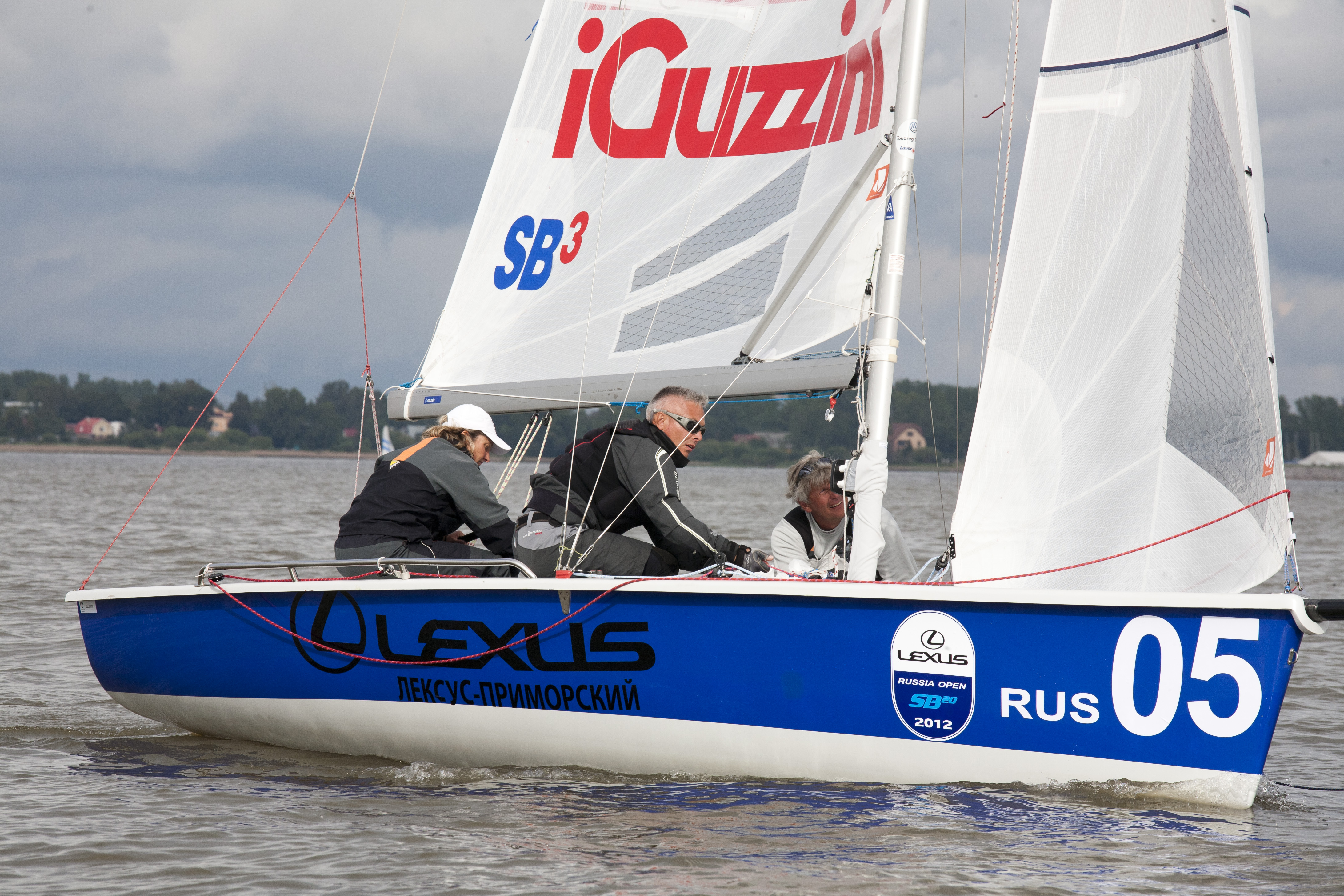 Открытый Чемпионат России 2012 в классе яхт SB20